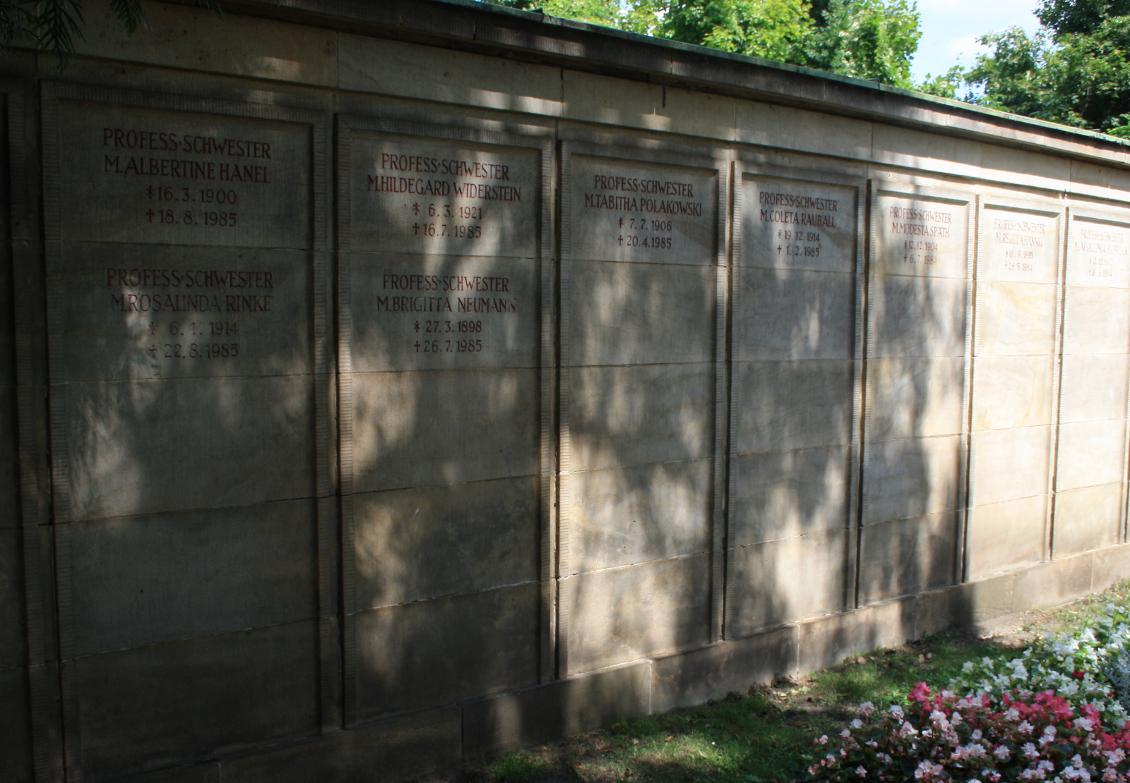 Die Gemeinschaftsgrabanlage der Grauen Schwestern von der Heiligen Elisabeth des St. Joseph-Stifts in Dresden